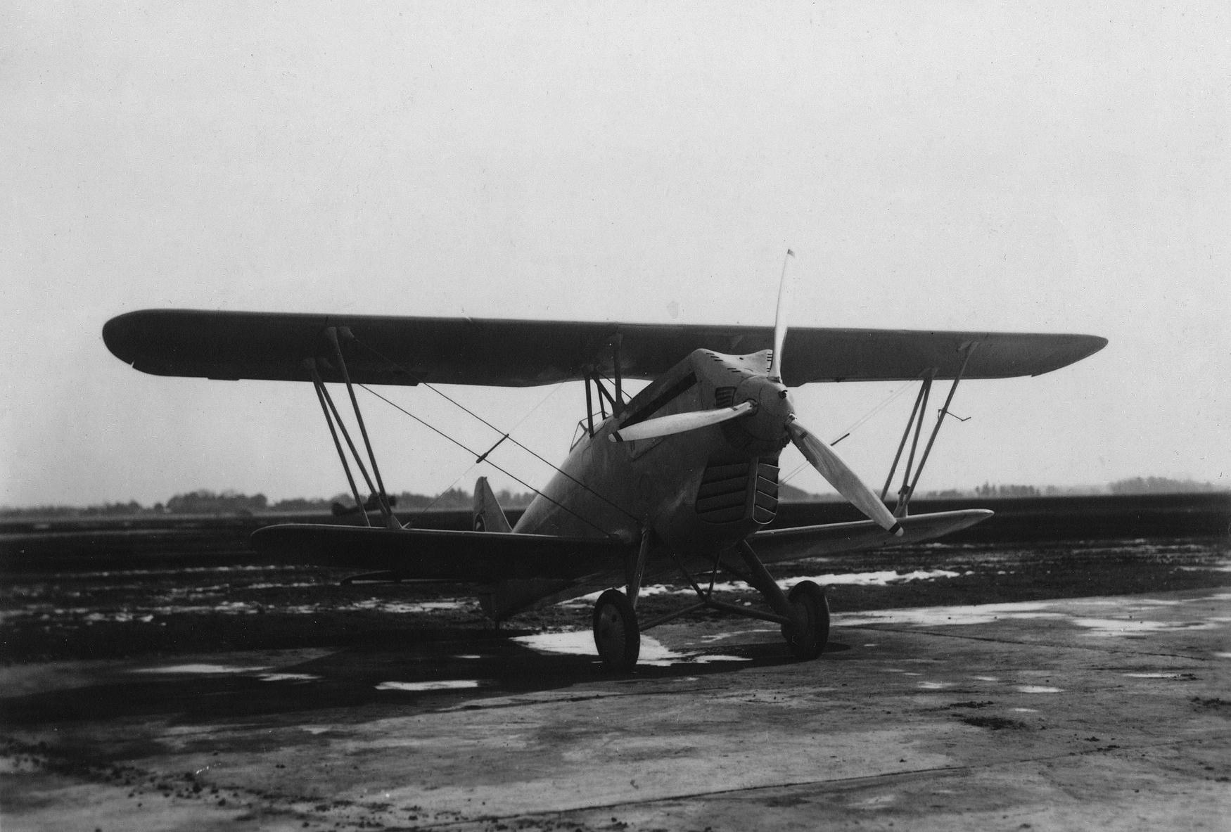 熊谷飛行学校の95式戦1型